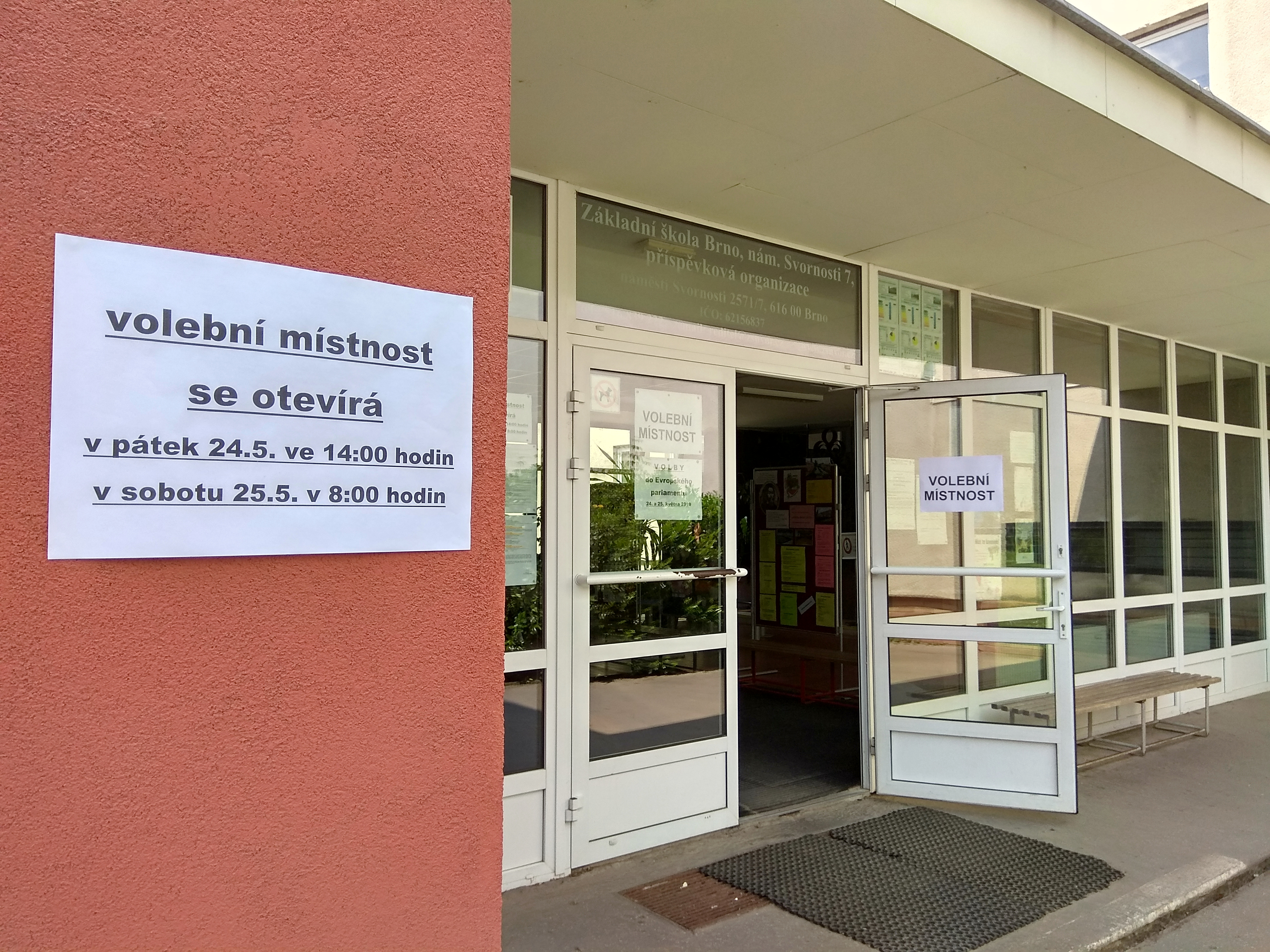 Základní škola Brno, náměstí Svornosti 7. Označení volební místnosti pro volby do Evropského parlamentu v ČR 24.-25. května 2019.